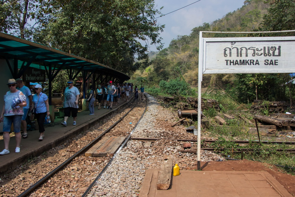 สถานีทางด้านฝั่งสถานีน้ำตก